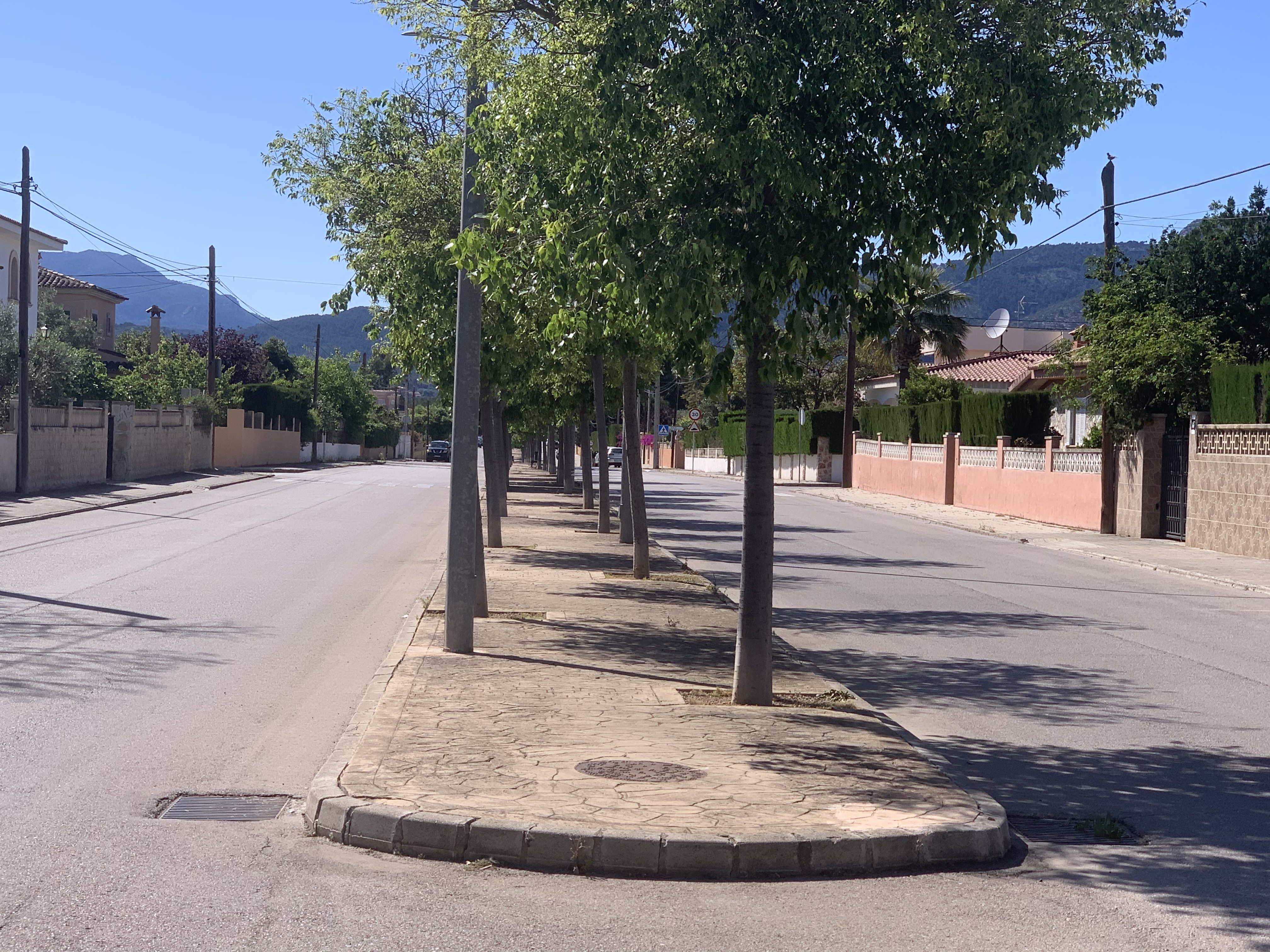 Carrer